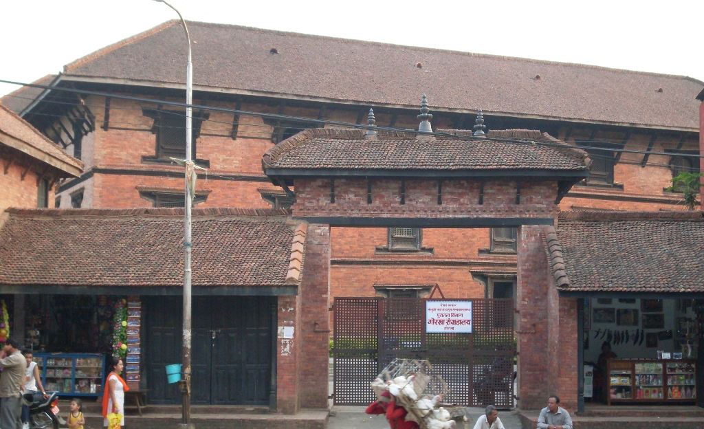 Gorkha palace